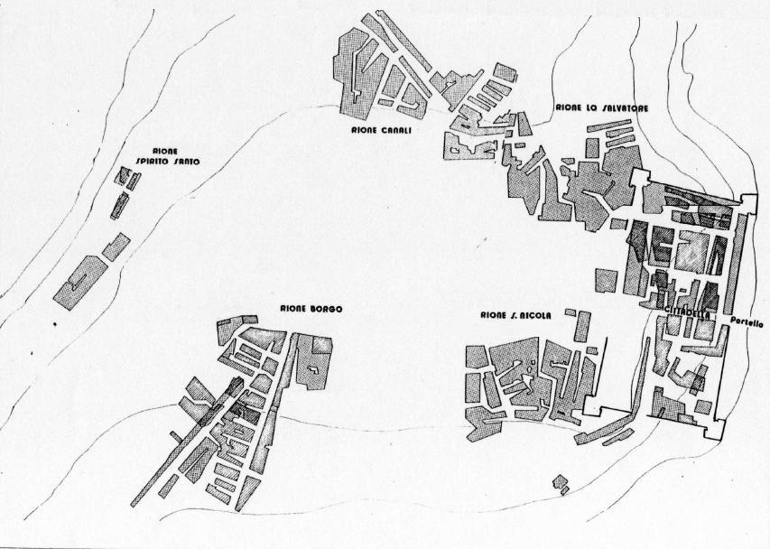 Mappa della città di Palmi nel XVII secolo